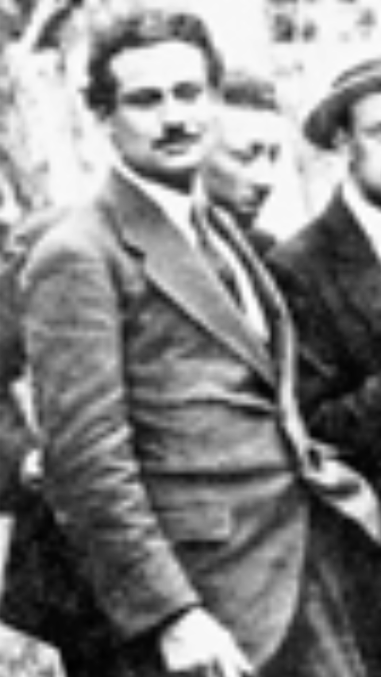 Ezequiel Plaza Garay o Exequiel Plaza Garay, nació en Santiago de Chile el 11 de agosto de 1892 y murió en la misma ciudad, el 19 de octubre de 1947. Fue un destacado pintor retratista, naturalista y costumbrista chileno.